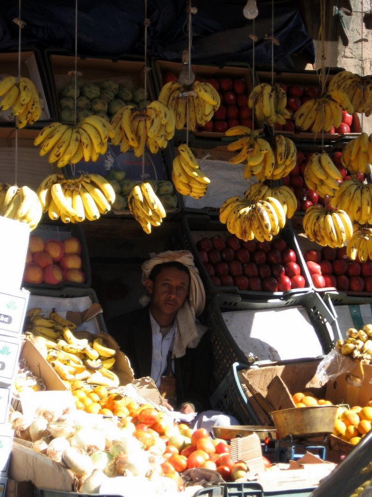 bananas seller in Dhamar